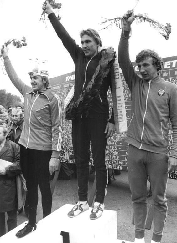 Tadeus Mytnik, Aavo Pikkuus, Wladimir Osoki ADN-ZB Reiche 8.5.77-str Warschau : 30.internationale Friedensfahrt. 1.Etappe. einen sowjetischen Triumph brachte das 28 km Zeitfahren durch die Straßen der der polnichen Hauptstadt am 8.5. Aavo Pikkuus (UdSSR,M.) siegte in 38:27 min vor dem polnischen Zeitfahrspezialisten Tadeus Mytnik und den zweiten sowjetischen Starter Wladimir Osoki. Die DDR-Fahrer belegten danach die Plätze 4 bis 8.